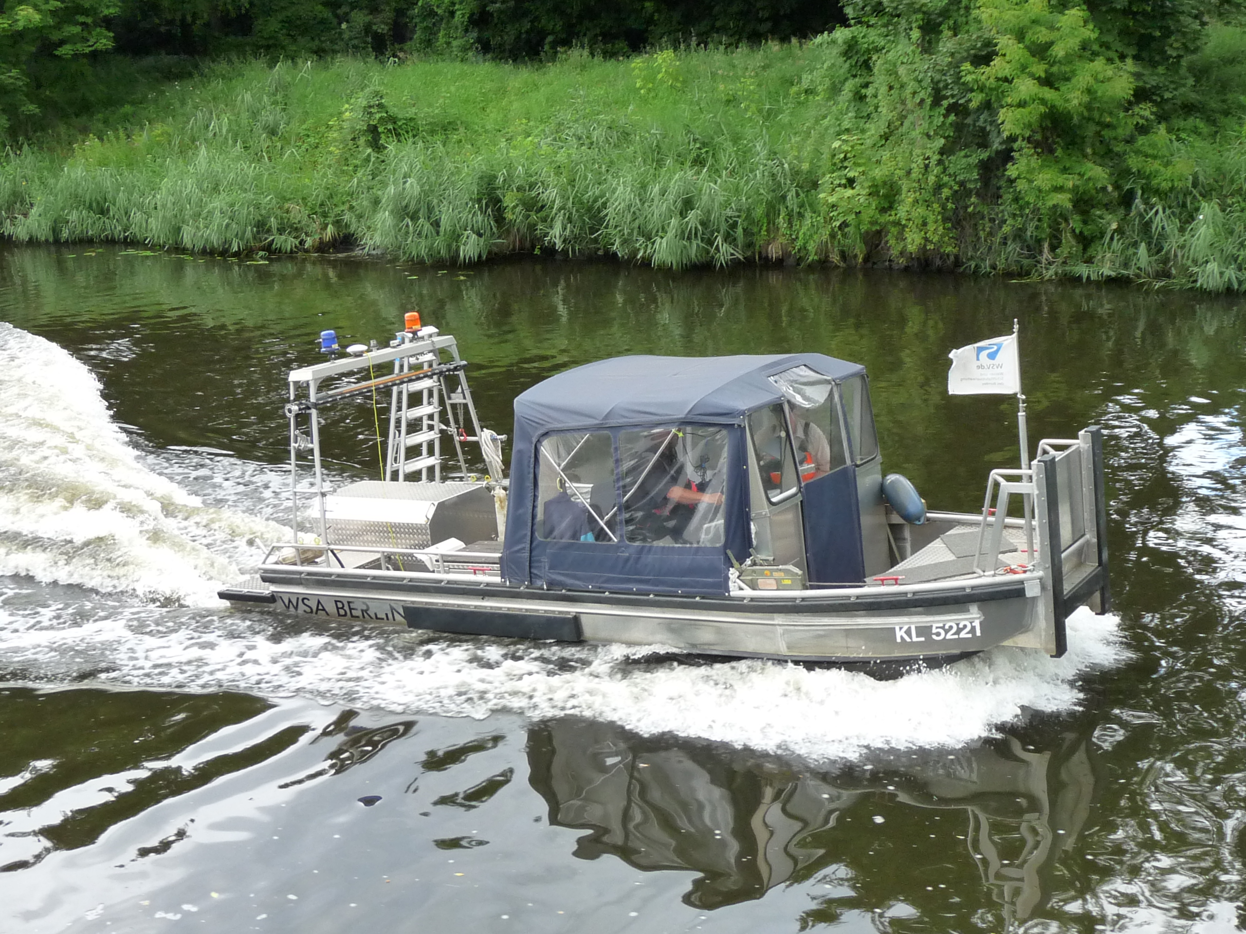 WSA-Fahrzeug